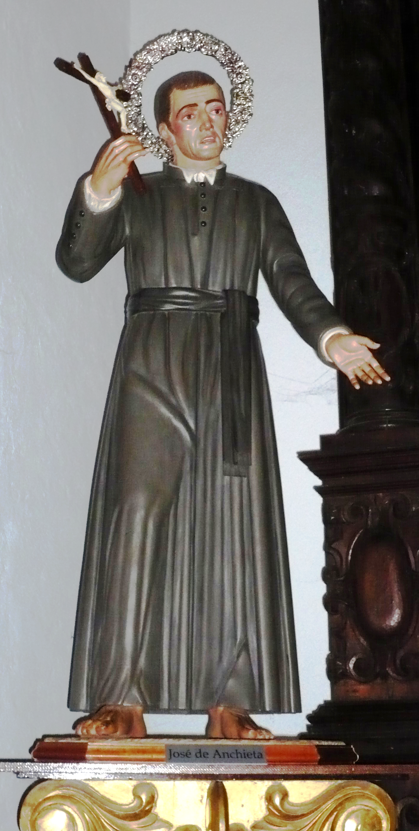 Statue of José de Anchieta. Iglesia de la Concepción (San Cristóbal de La Laguna). Tenerife, Canary Islands.